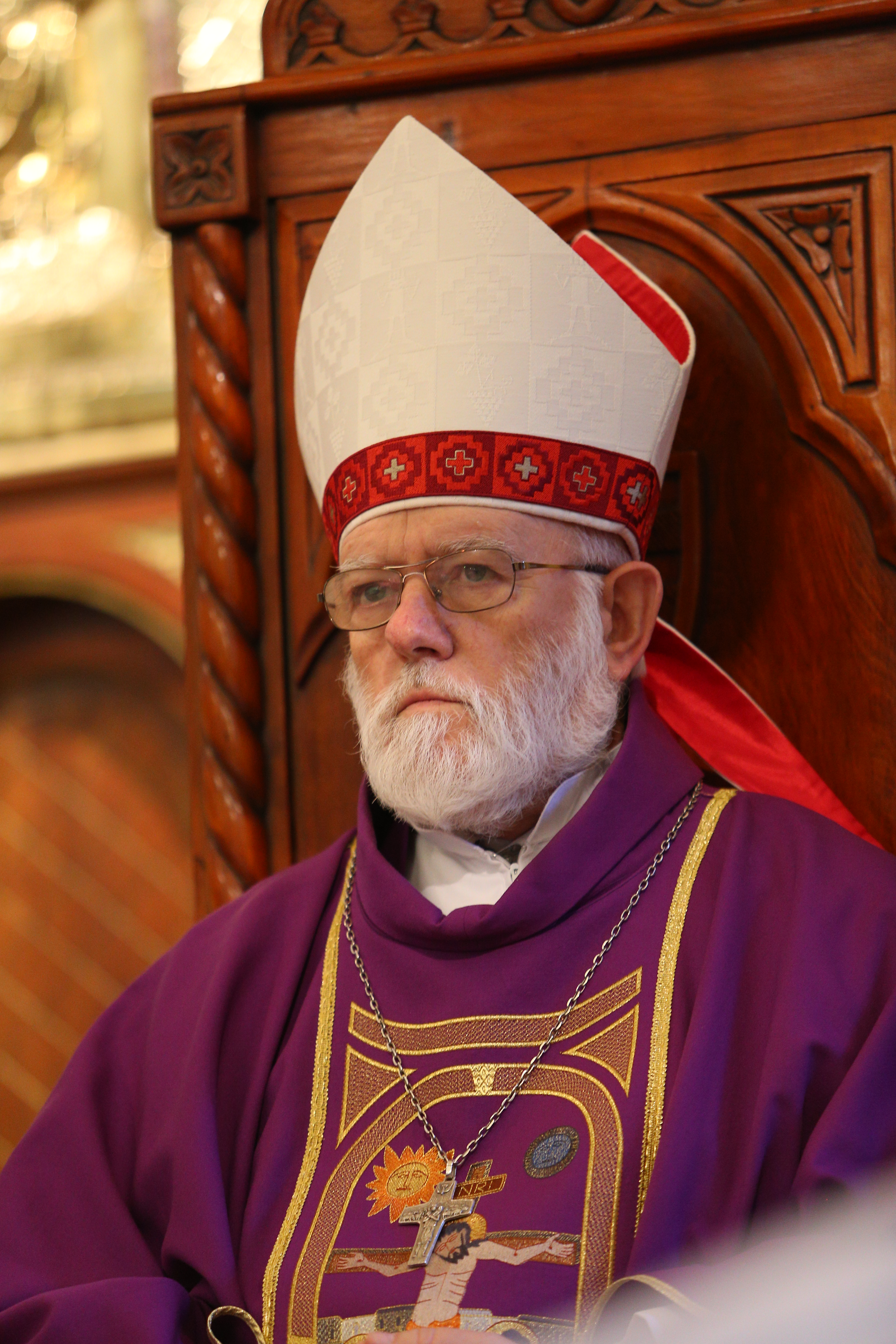 Celestino Aós oficia la Misa de Inauguración del Año Académico 2019 en la Pontificia Universidad Católica de Chile.